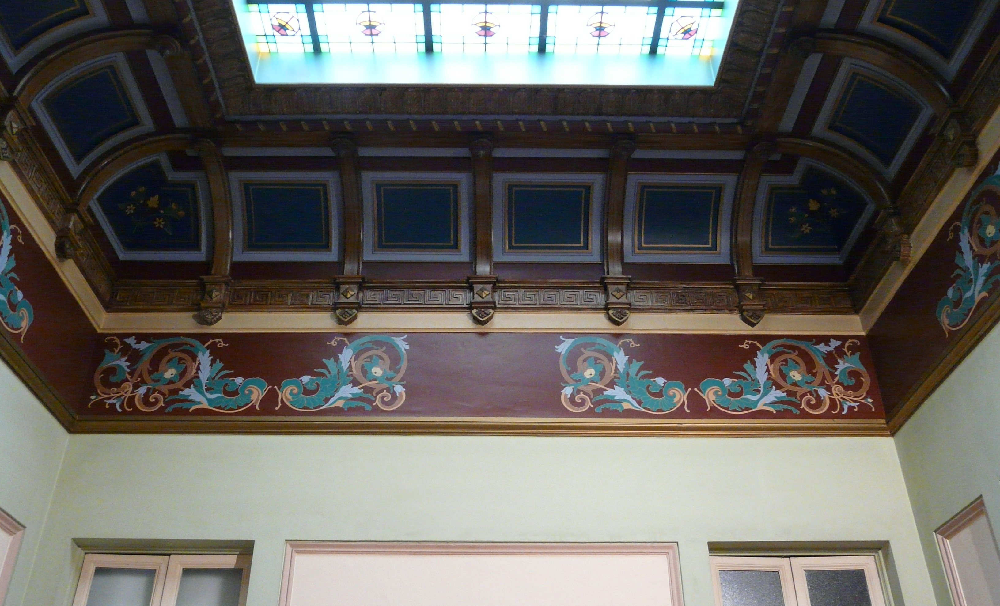 Casa Elizalde (Barcelona)